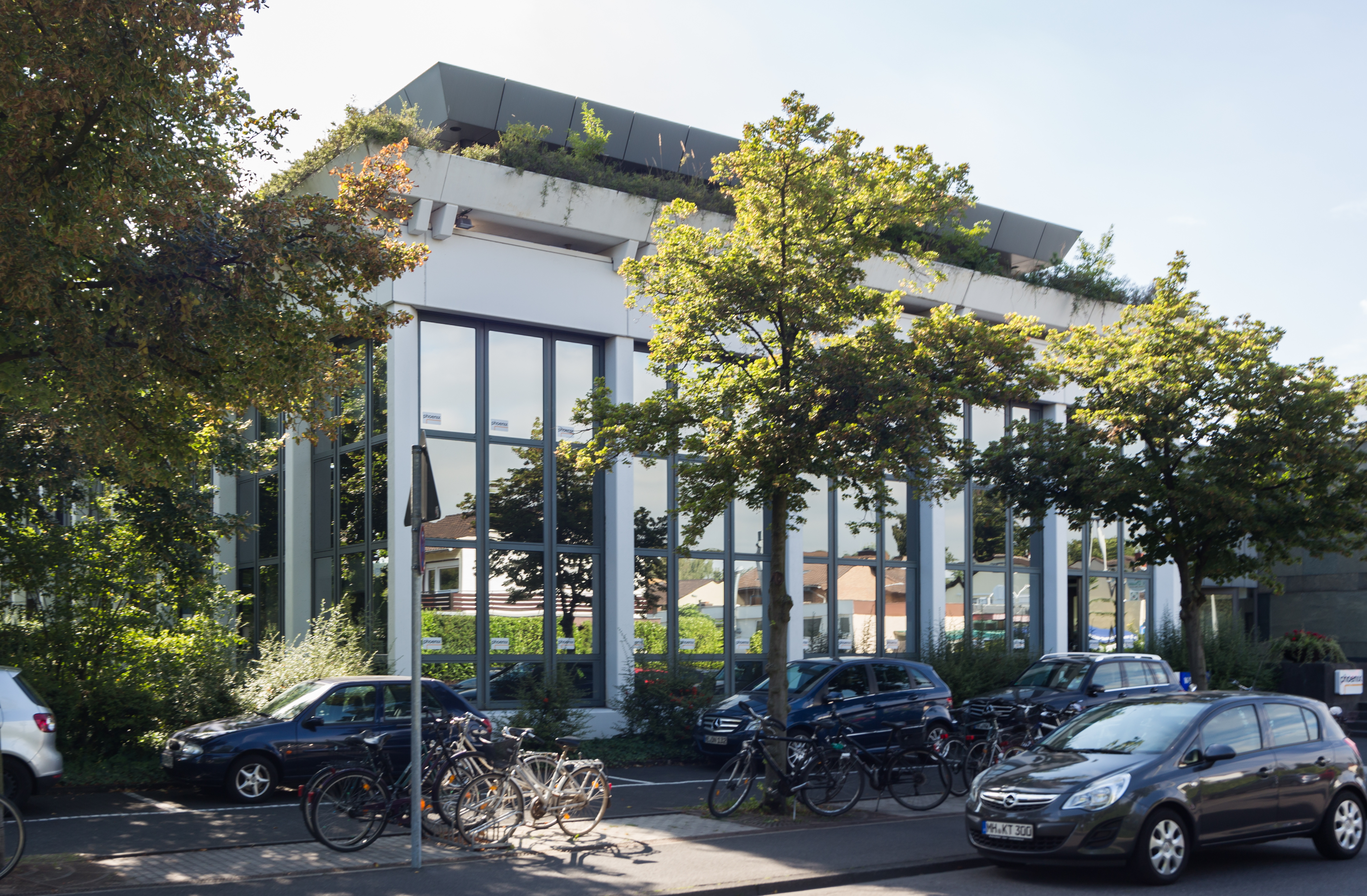 Langer Grabenweg 45, Bonn, district Hochkreuz